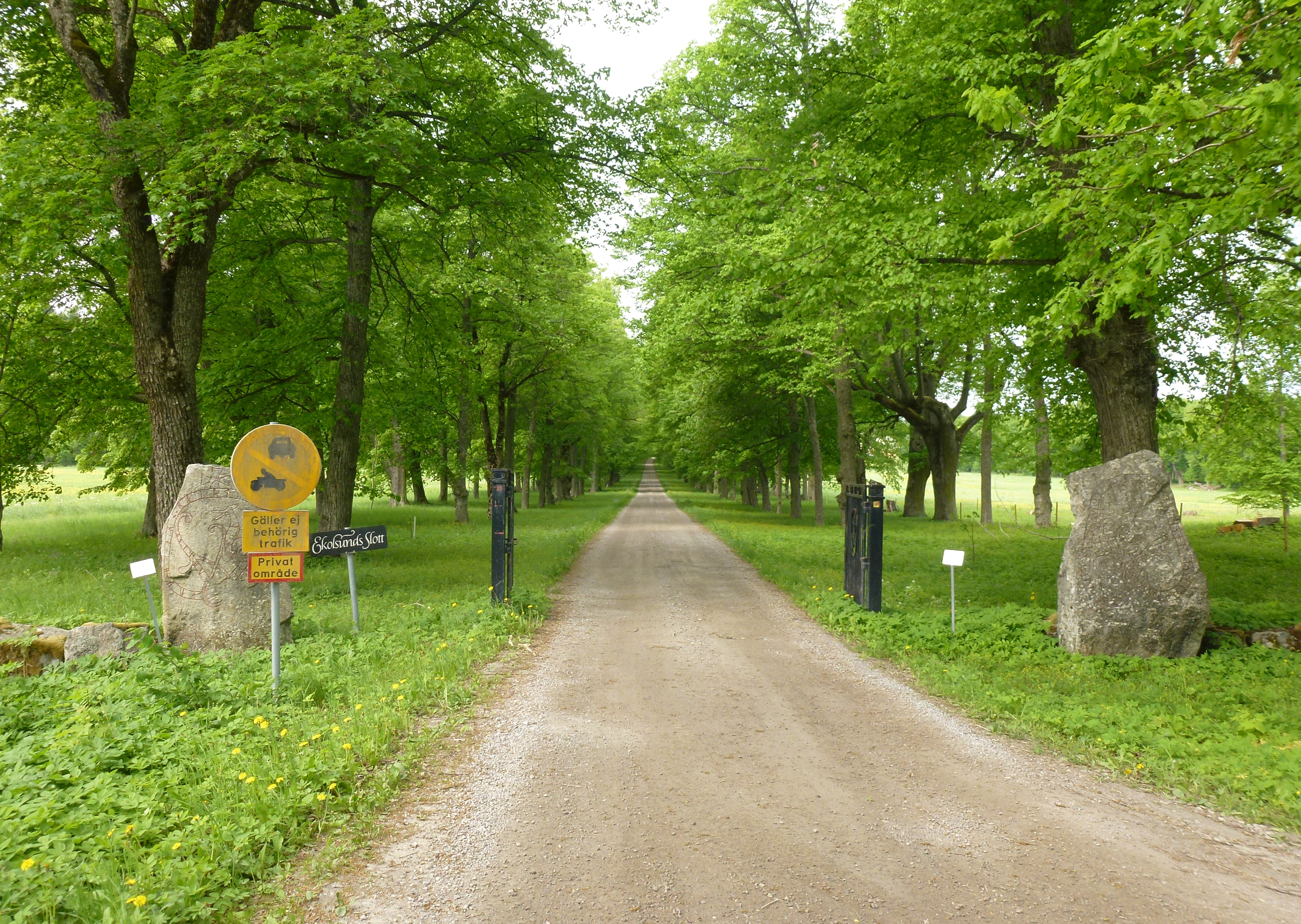 Ekolsunds allé söderifrån